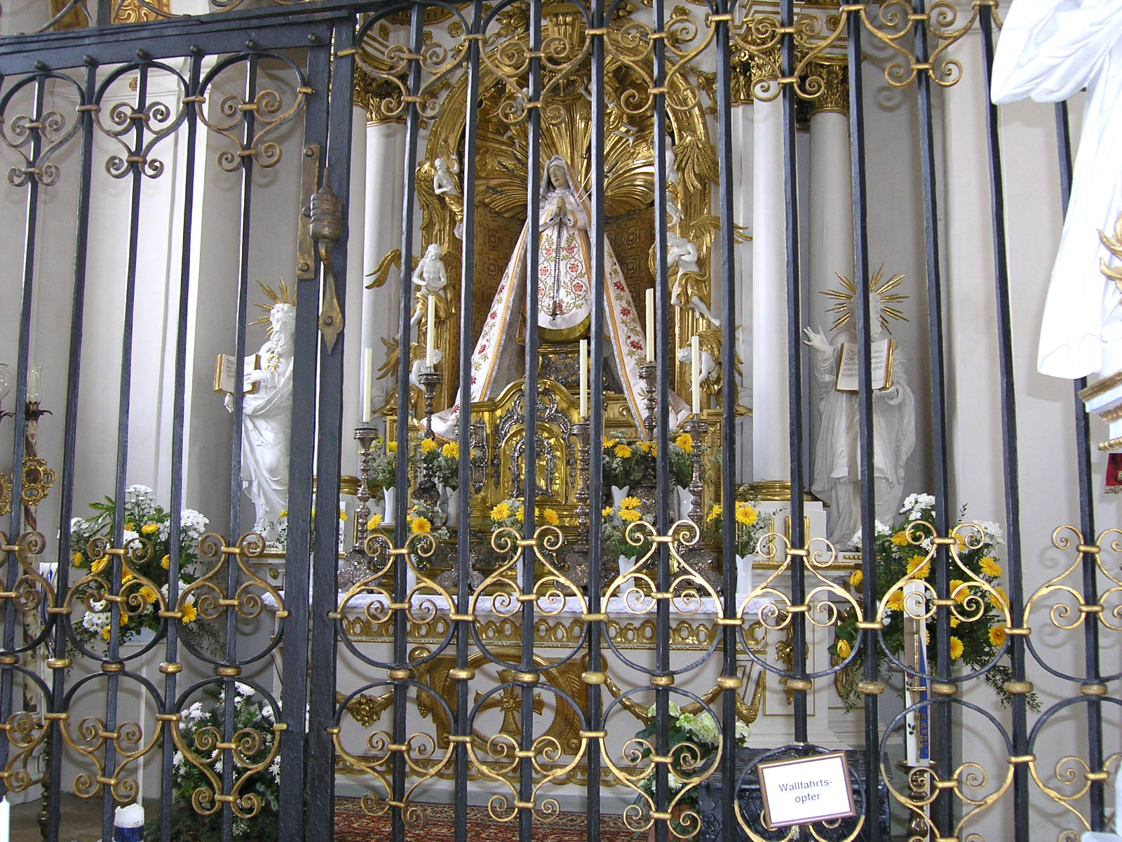 Klosterkirche Oberelchingen. Maria von den Sieben Schmerzen The monastery church of Oberelchingen. Mary of the seven pains Date: 2006-04-18